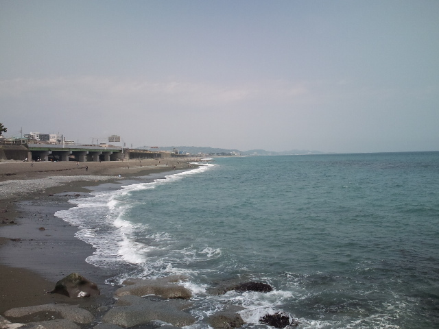 小田原市の御幸の浜